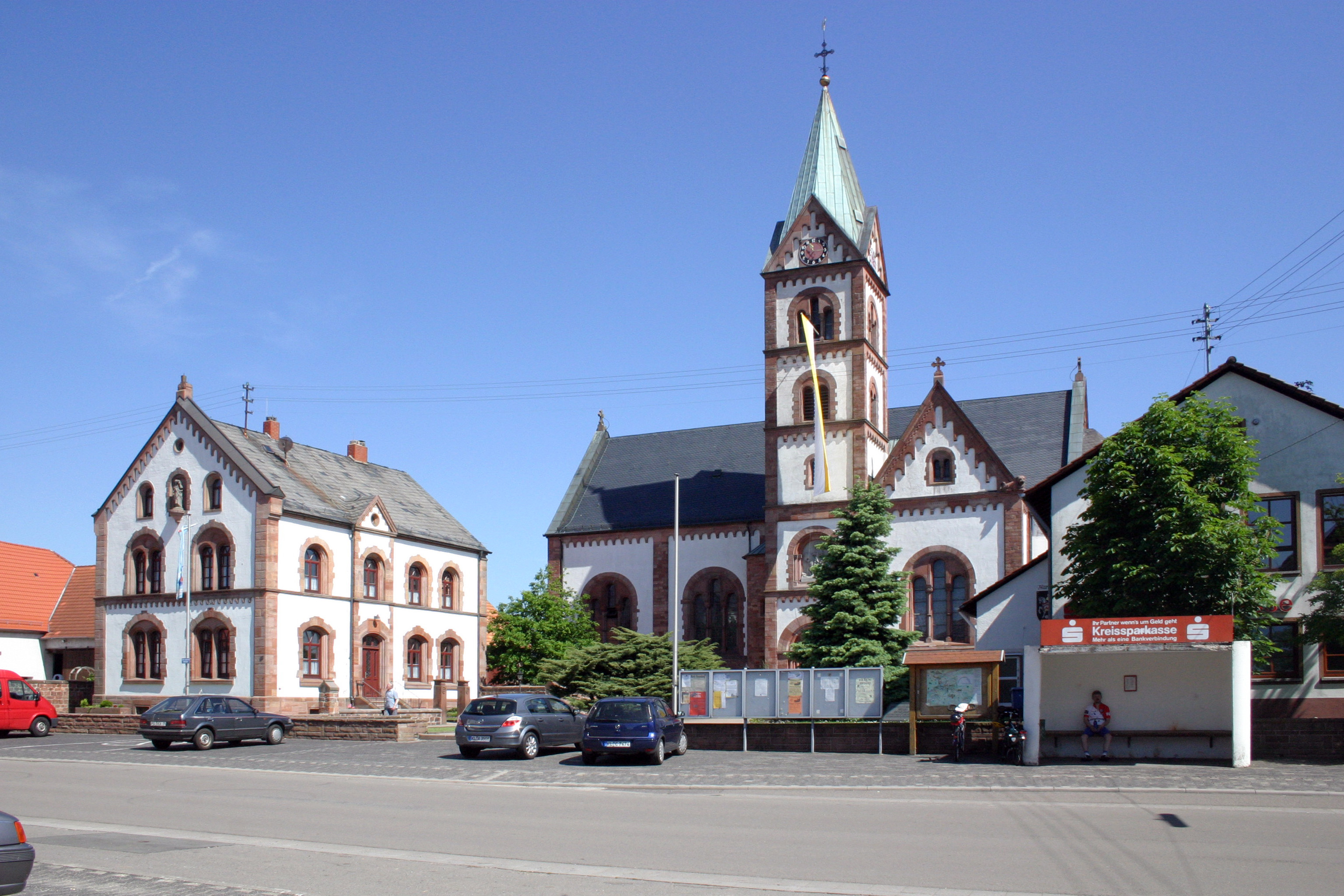 Martinshöhe